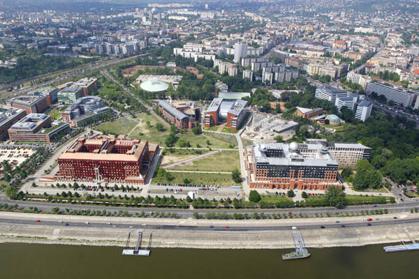 Az ELTE a magasból